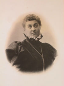 Ольга Дмитриевна Нелидова, ур. Хилкова (1839—1918)